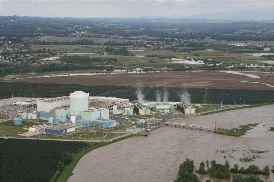 2010 floods in Slovenia